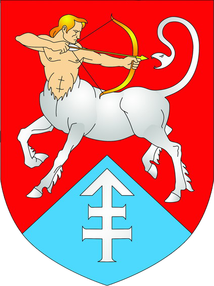 Беларуская (тарашкевіца): Герб Гальшанаў